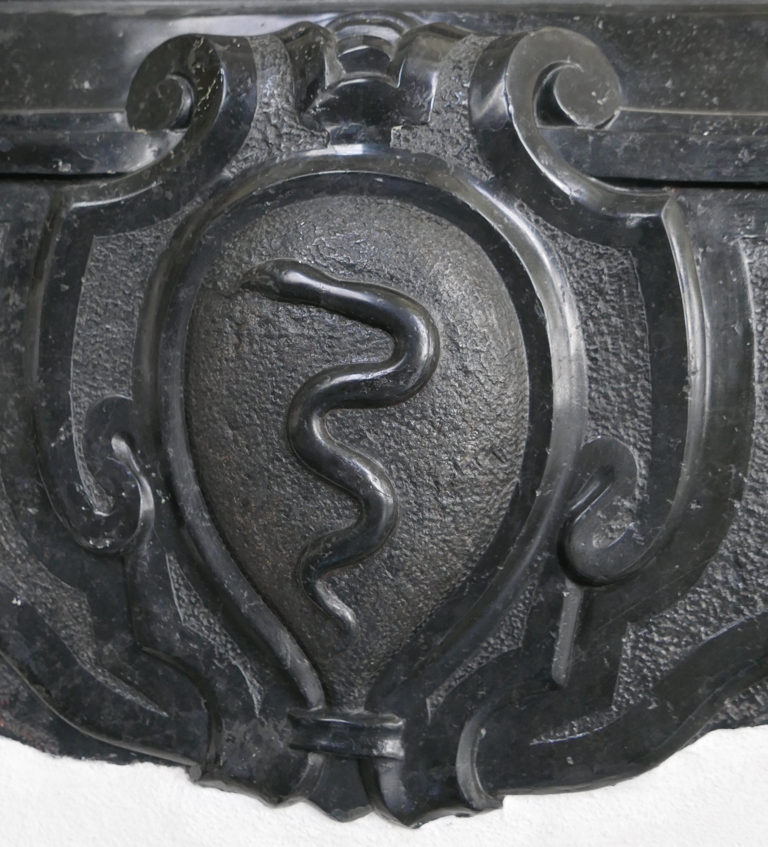 Nagrobek Zofii zm. 1630 - krużganki przy klasztorze dominikanów w Krakowie